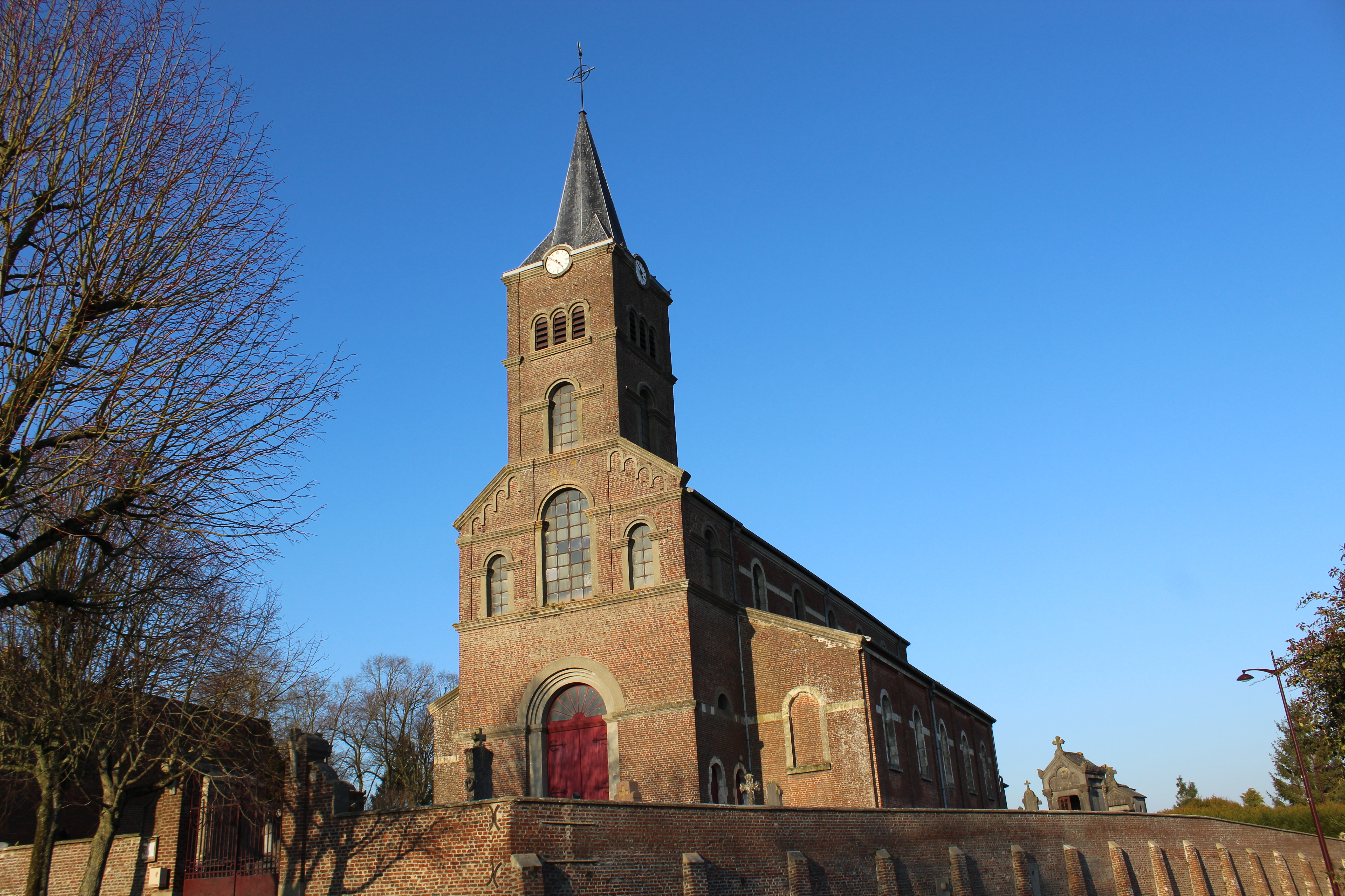 L'église.